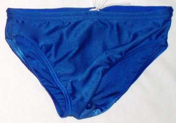 A blue Speedo style suit